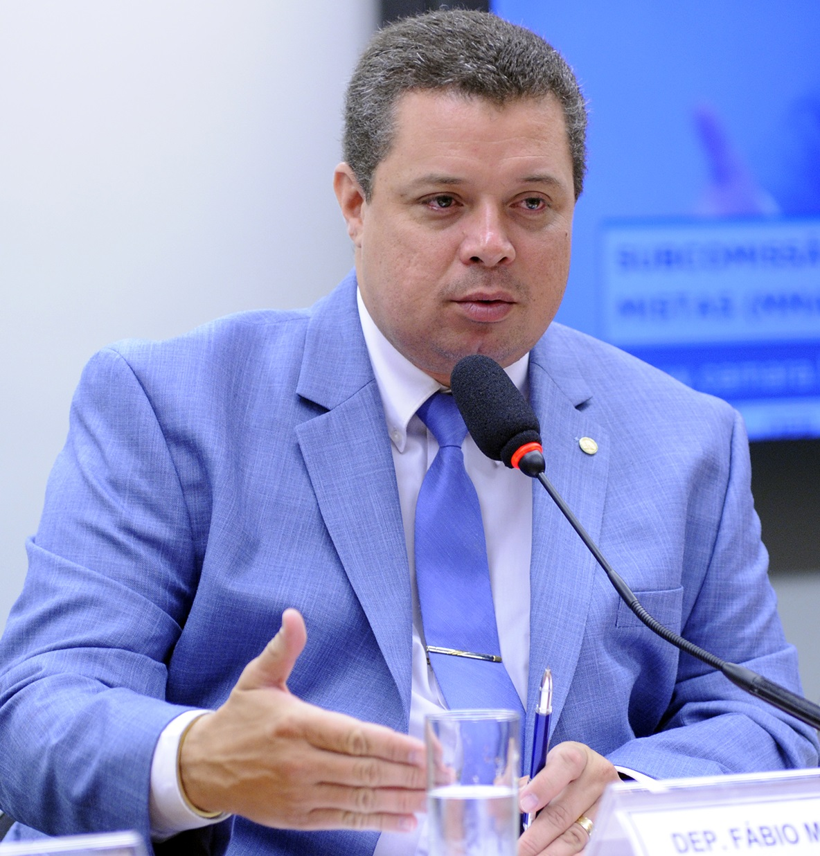 Fábio Mitidieri em dezembro de 2016.